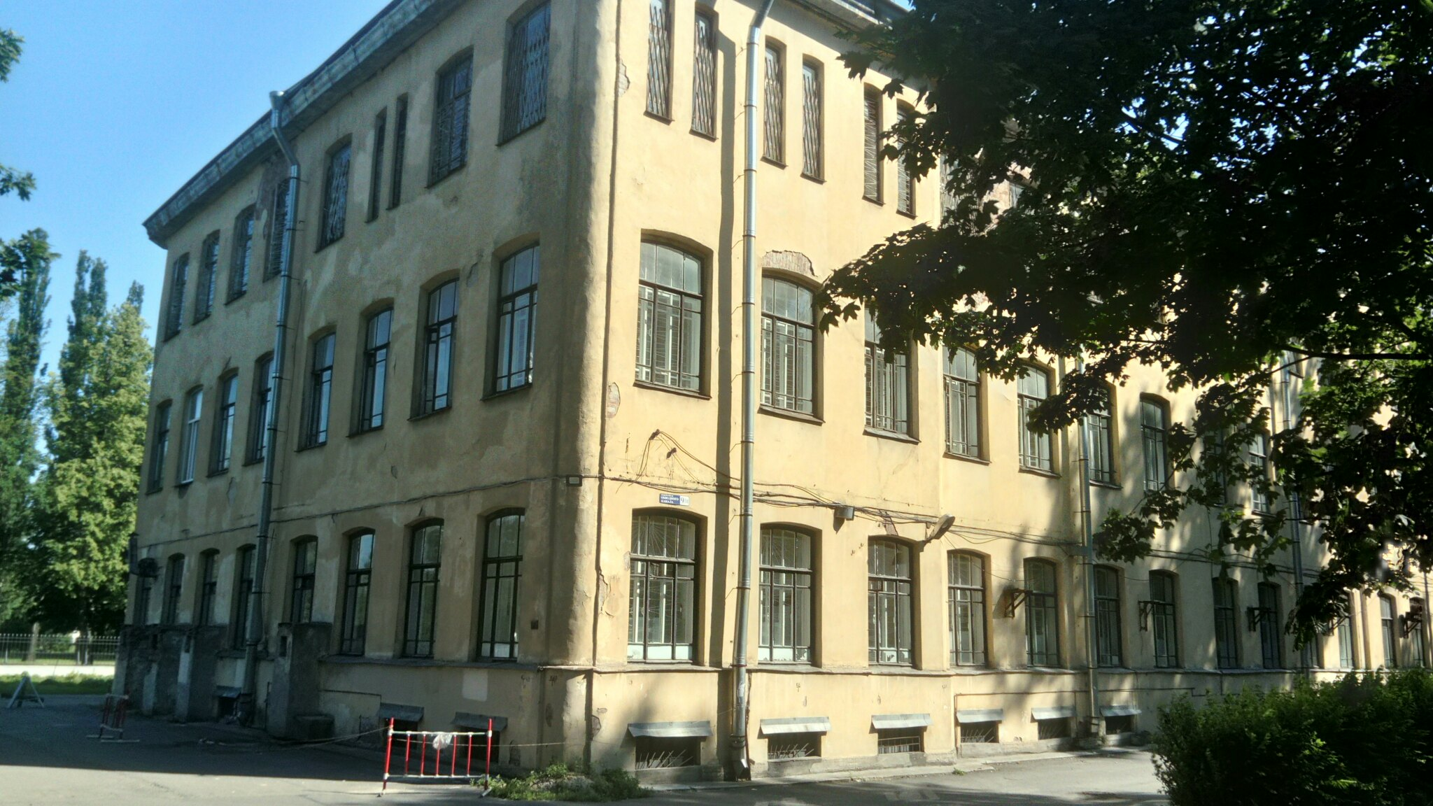 Старый корпус Психиатрической клиники на Обводном канале